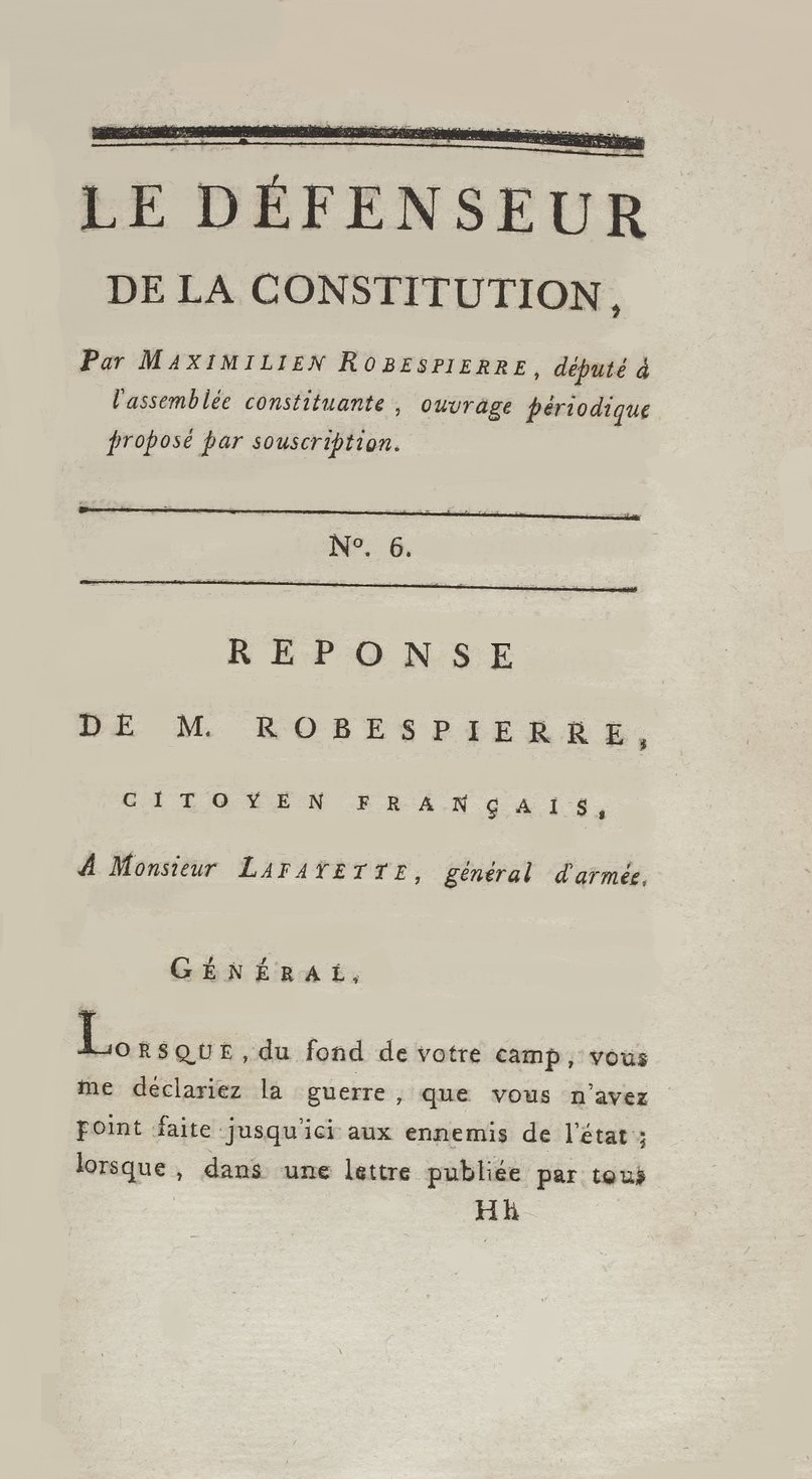 Le Défenseur de la Constitution n° 6 - Réponse de Robespierre... 1792